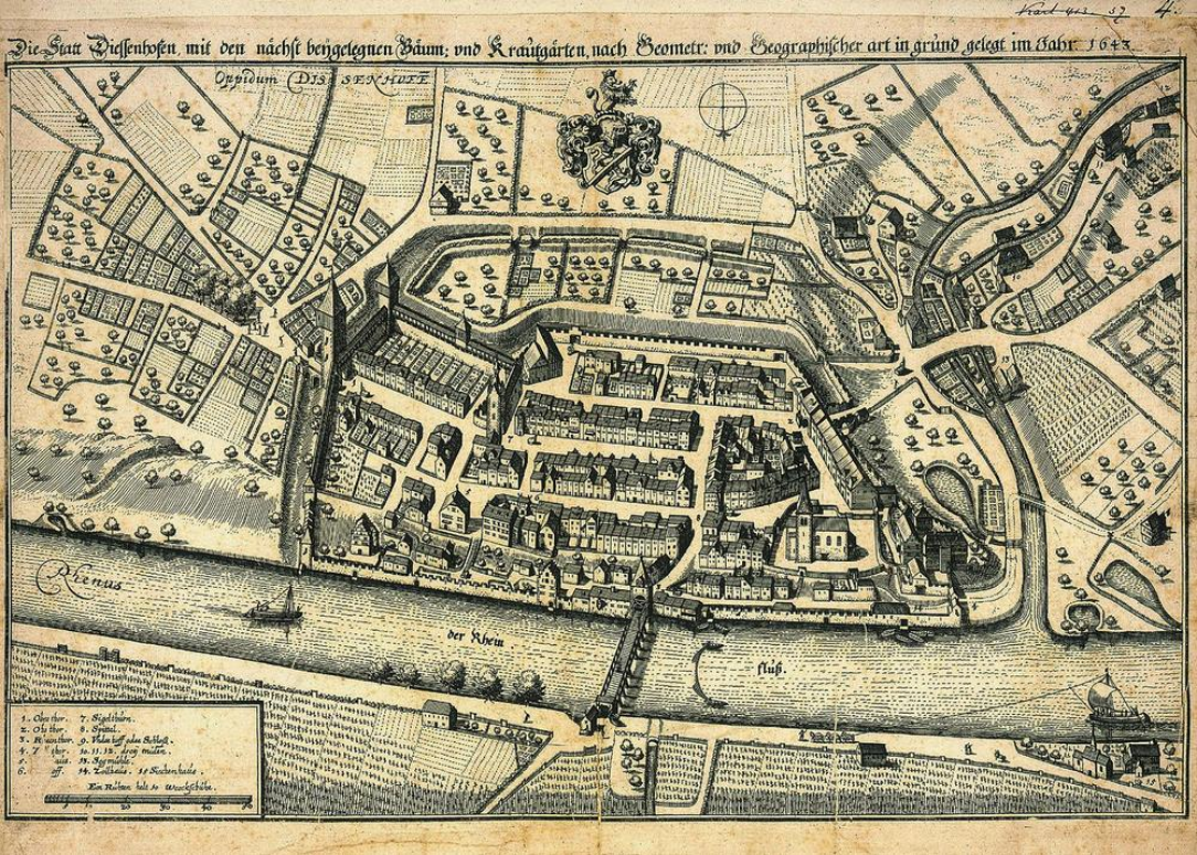 Die Stadt Diessenhofen und ihre Umgebung um 1643. Radierung, die 1654 in der Topographia Helvetiae, Rhaetiae et Valesiae von Matthaeus Merian erschien (Universitätsbibliothek Bern, Sammlung Ryhiner).